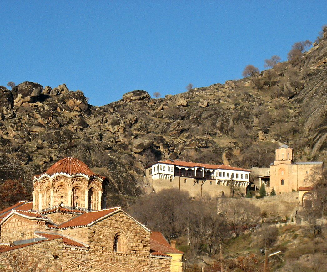 Црква Св. Димитрија и Манастир Св. Архангел Михаел, Варош, Прилеп